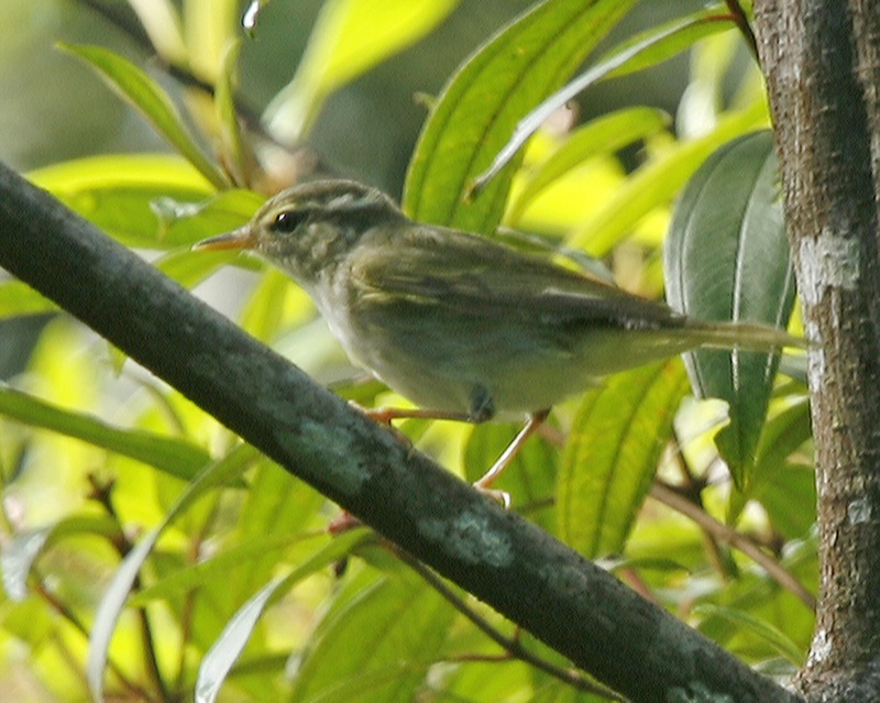 Arctic Warbler (Phylloscopus borealis) Pierce Reservoir, Singapore February 12, 2006 Malay: Cekup Daun Artik Indonesian: Cikrak kutub, Perenjak kutub Distribution